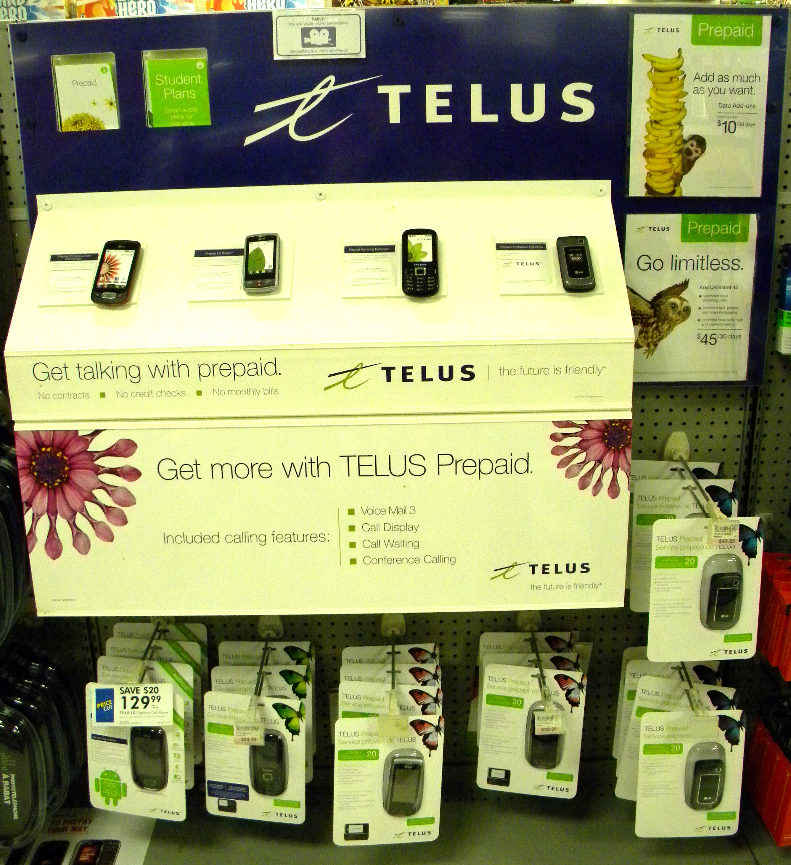 Affichage des produits prépayés Telus Mobilité chez Zellers.